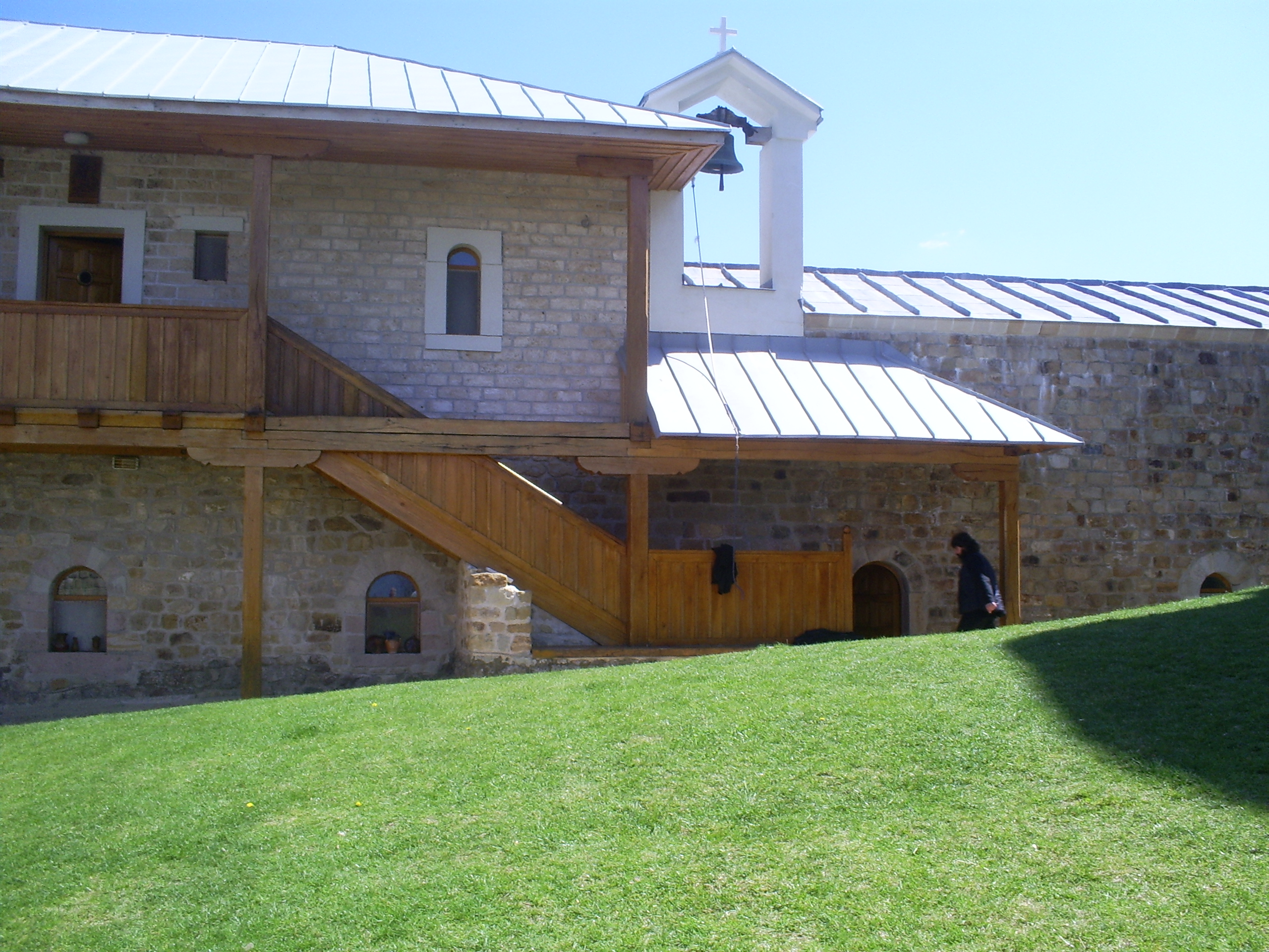 Manastir Djurdjevi stupovi